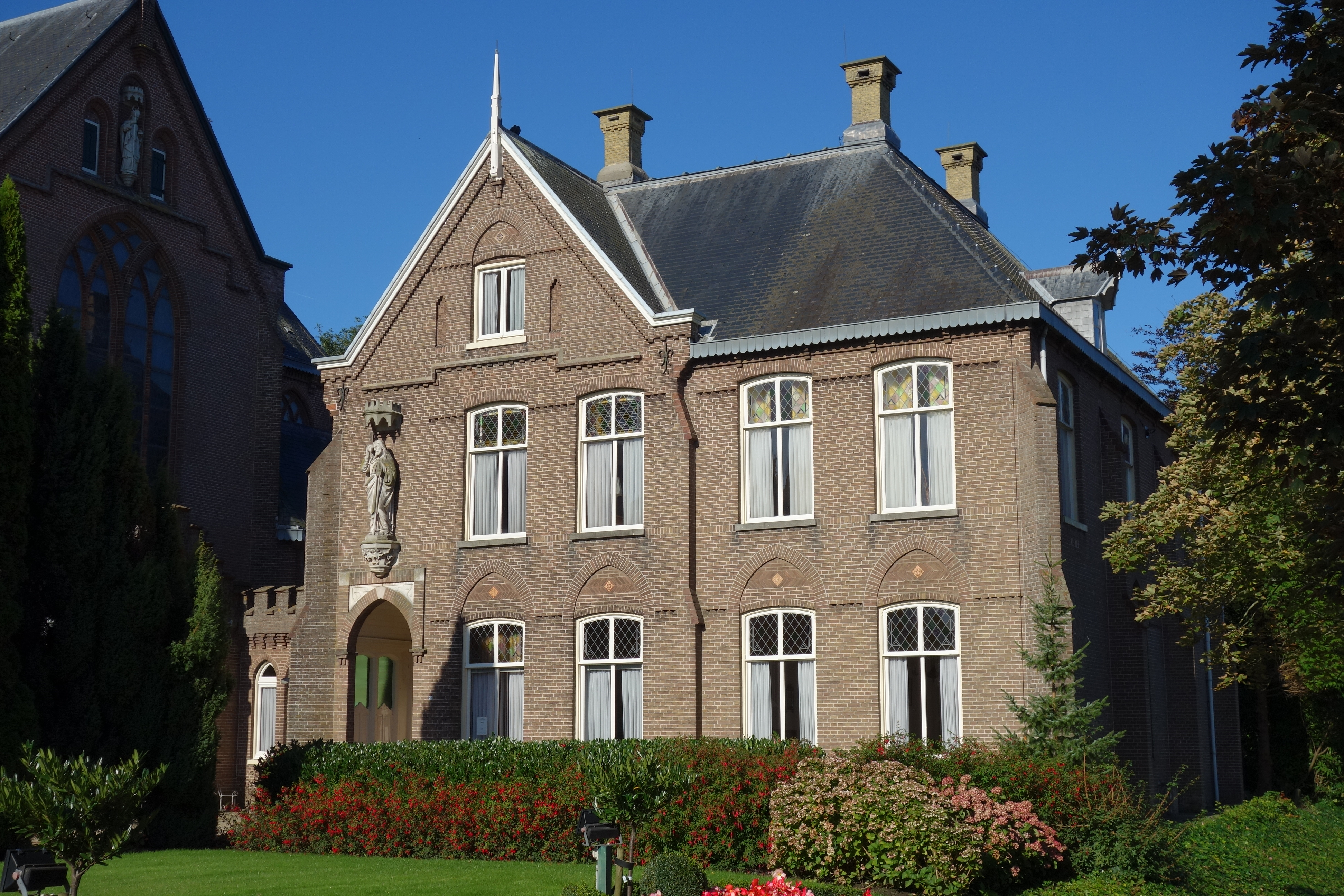 De pastorie van de Cunerakerk in Nibbixwoud. Gebouw is, net als de naastgelegen kerk, ontworpen door de Hoornse architect Adrianus Bleijs.